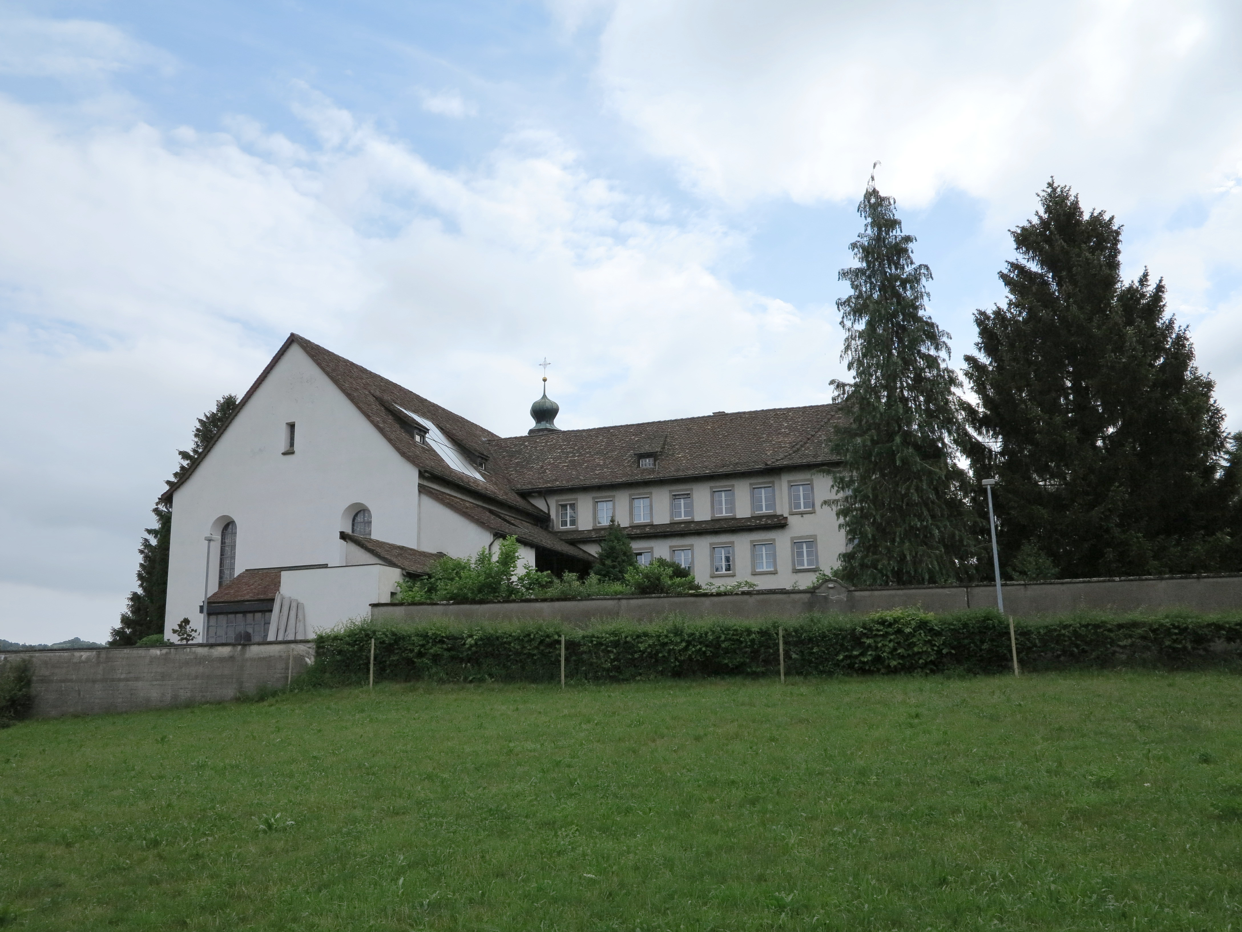 Westansicht des Kapuzinerklosters Wil